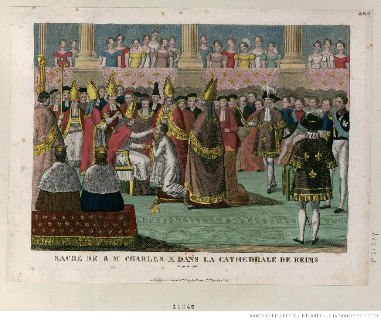 Estampe couleur (1825) représentant le sacre de Charles X de France, le 29 mai 1825 à Reims.